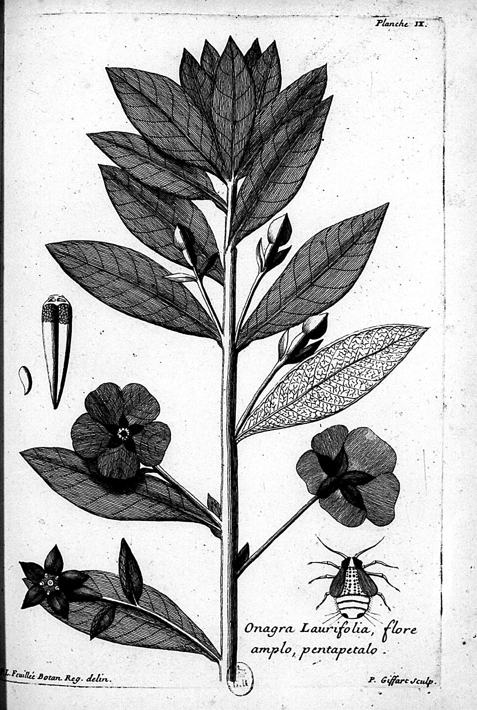 A droite de la planche "Alkekengi Virginianum fructuluteo vulgo Capuli". In: "Journal des Observations Physiques, Mathematiques et Botaniques, faites par l'ordre du roy sur les côtes orientales de l'Amérique méridionale & aux Indes occidentales. Et dans un autre voyage fait par le même ordre à la Nouvelle Espagne & aux Isles de l'Amérique. (Paris-1725)" by Louis Feuillee, (1660-1732).